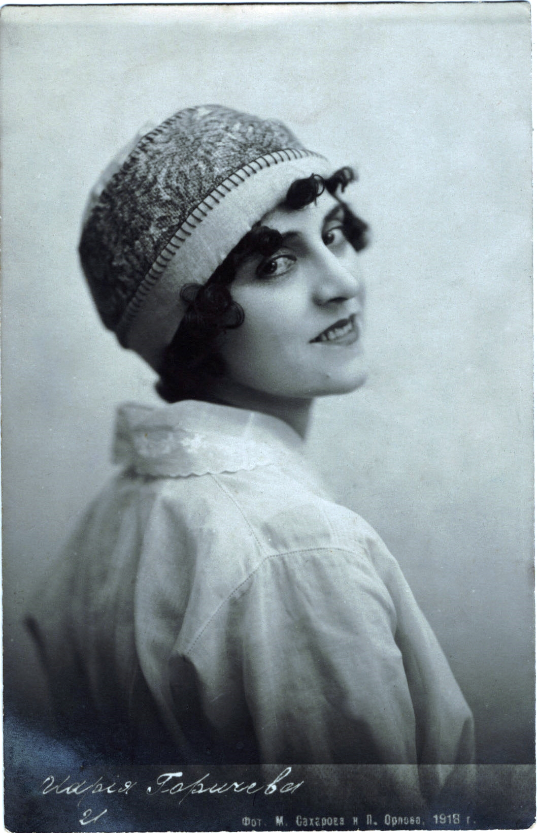 Горичева, Мария Матвеевна